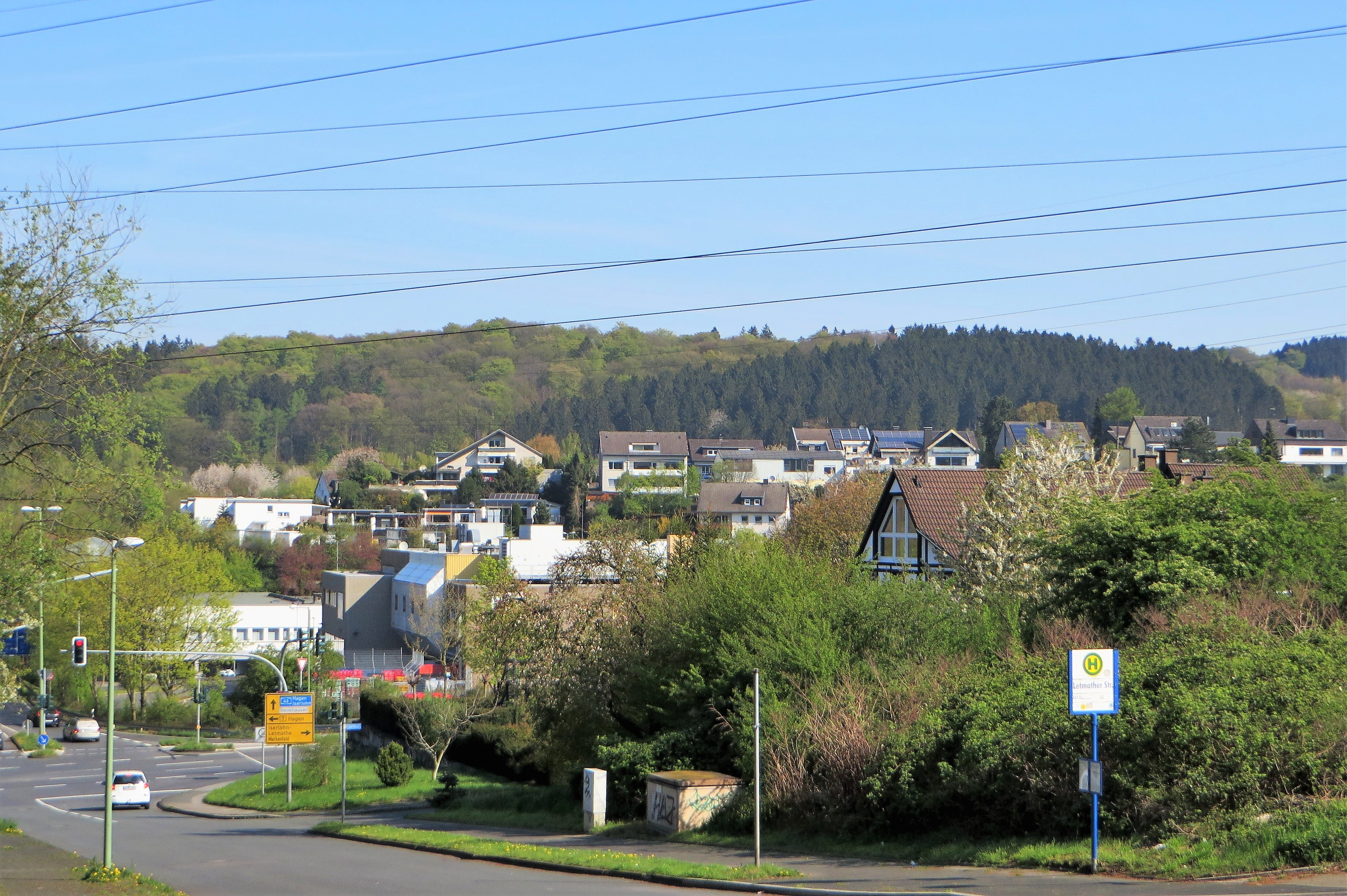 Landschaftsschutzgebiet „Bemberg“ im Hagener Stadtteil Hohenlimburg, Ortsteil Elsey. Blick von der Straße „Steltenberg“ über die Iserlohner Straße, A 46 und Berliner Allee auf das dahinter liegende geschützte Waldgebiet Dromsiepen und Bemberg (254 m).